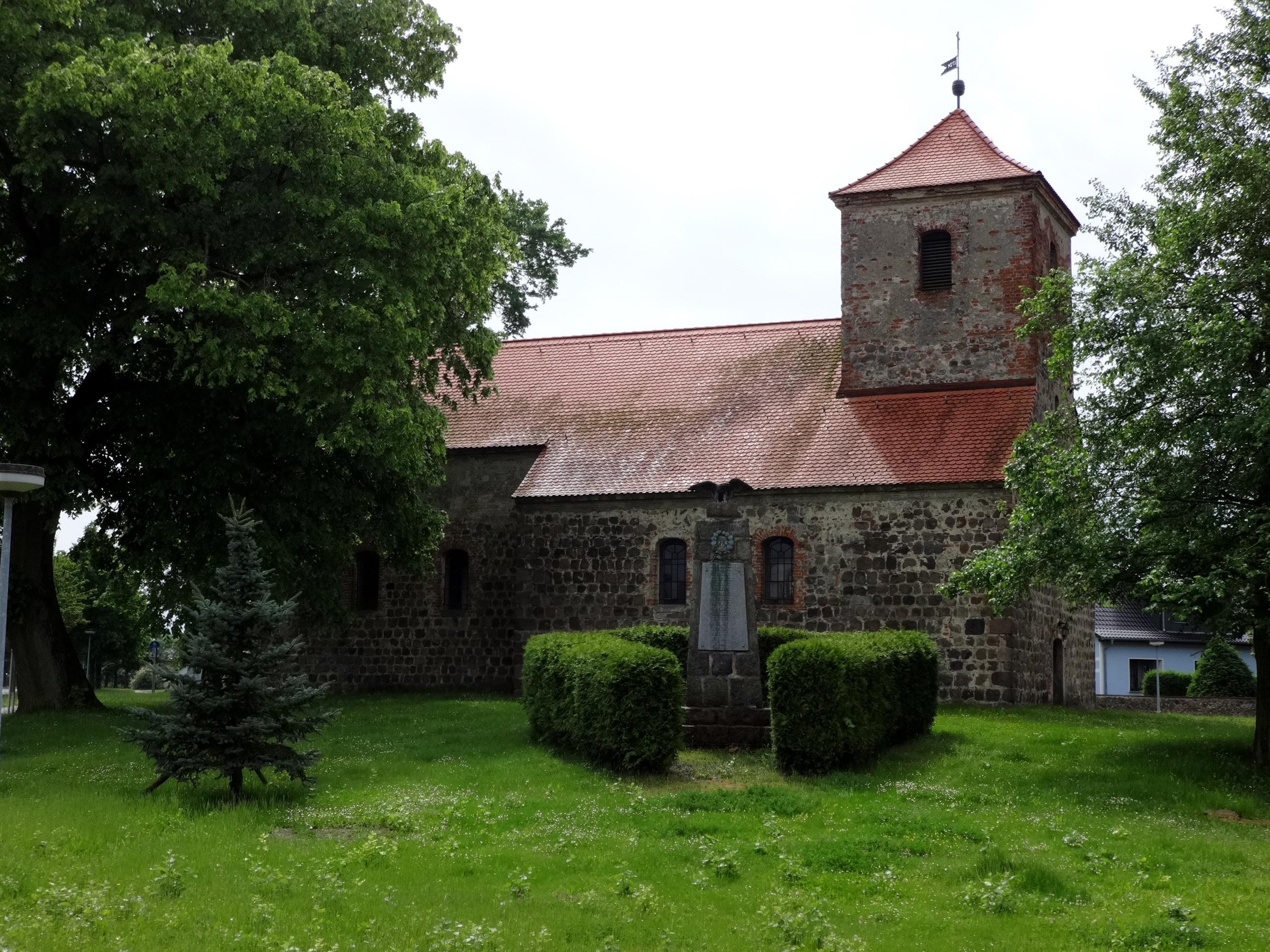 Dorfkirche Garzau, Feldsteinquaderbau aus dem 13. Jahrhundert im Landkreis Märkisch-Oderland, Brandenburg